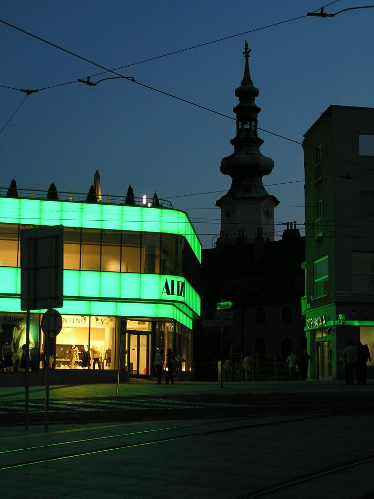 Veľký Baťa a Michalská veža